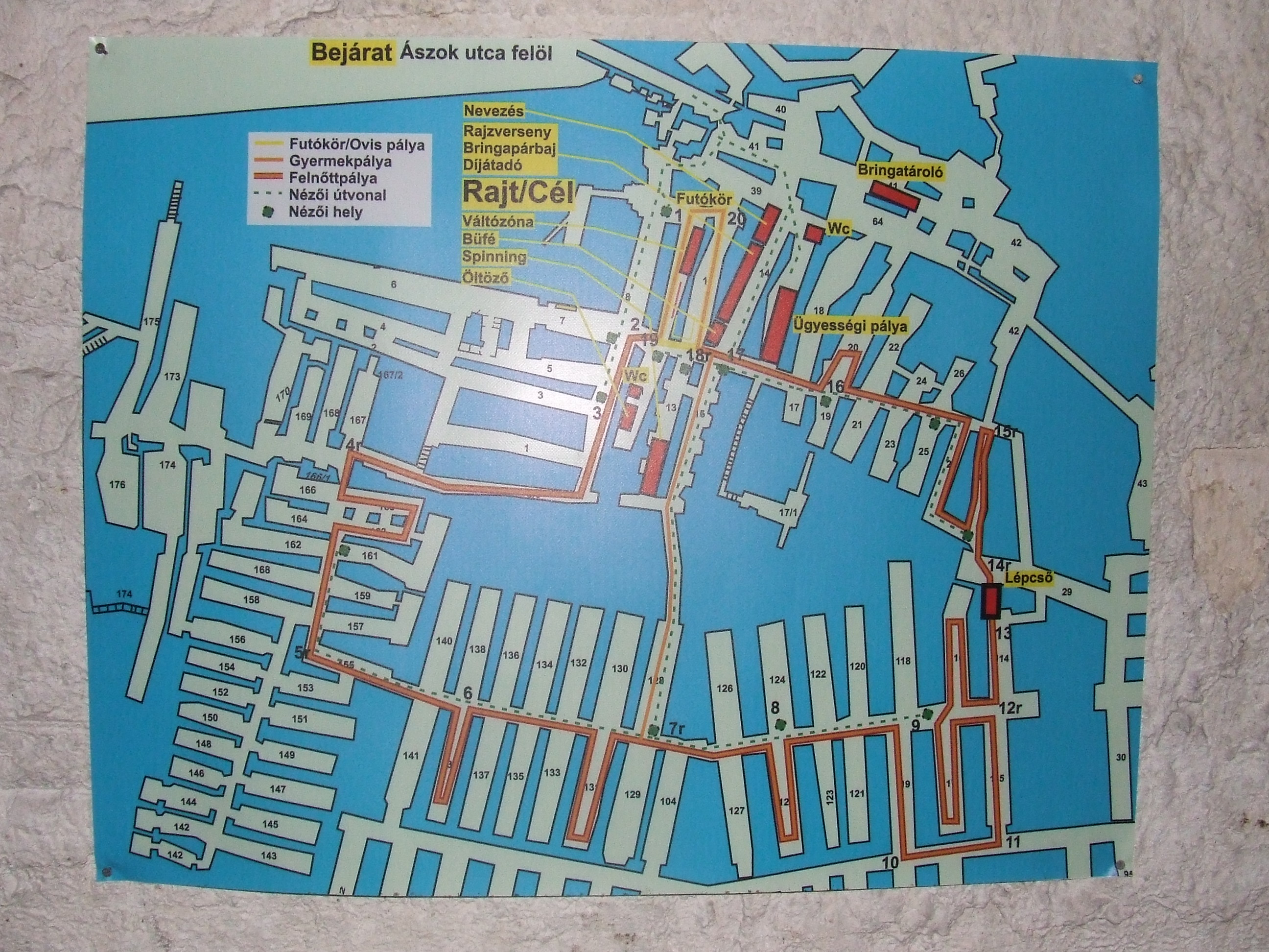 Kőbányai pincerendszer Kőbánya, Havas Ignác utca